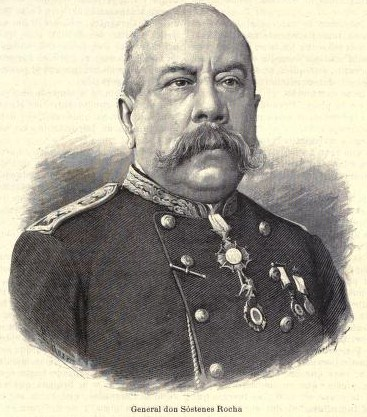 General Sóstenes Rocha, político y militar mexicano